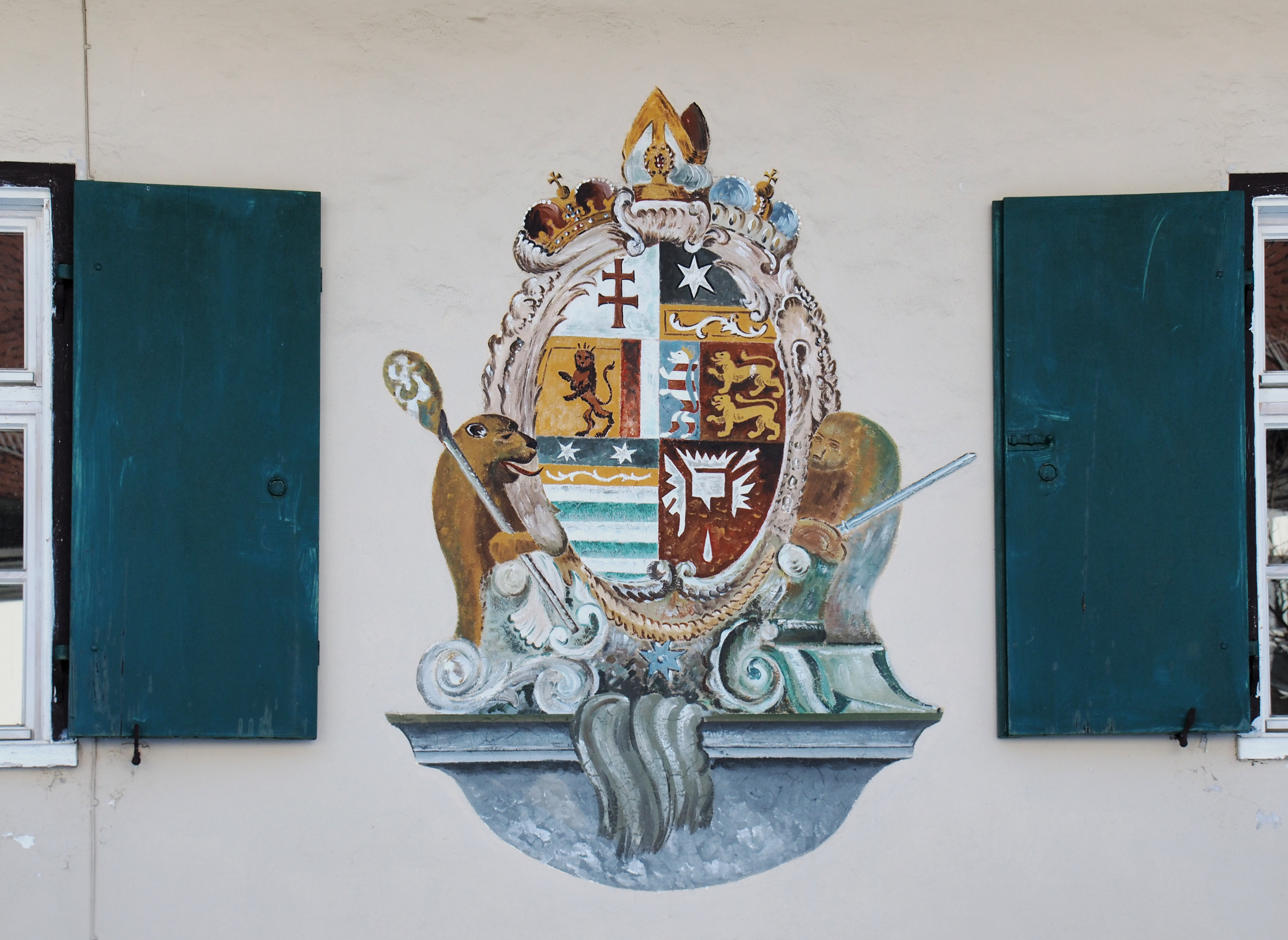 Wappen des Fürstbischofs und Landgrafen Joseph Ignaz Philipp von Hessen-Darmstadt am ehemaligen Stutenhof in Bad Hindelang, 1660 erbaut